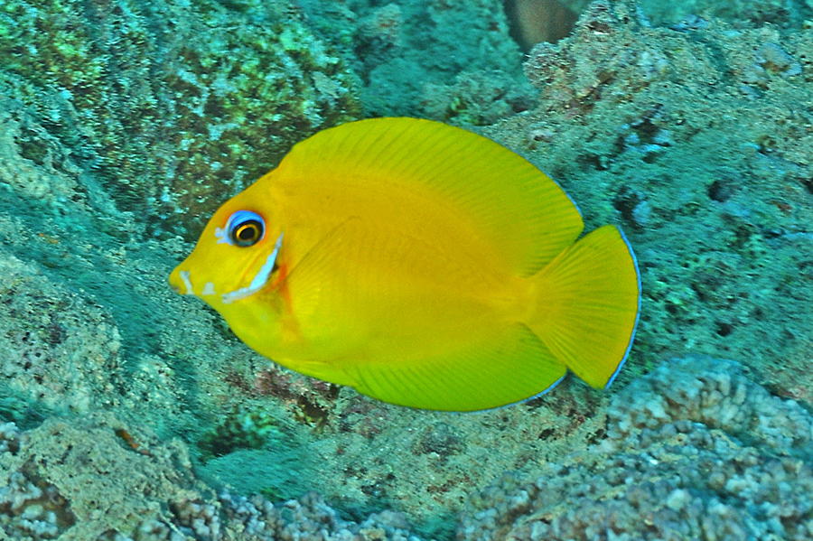 Acanthurus pyroferus juvenil en las islas Sociedad, Polinesia Francesa